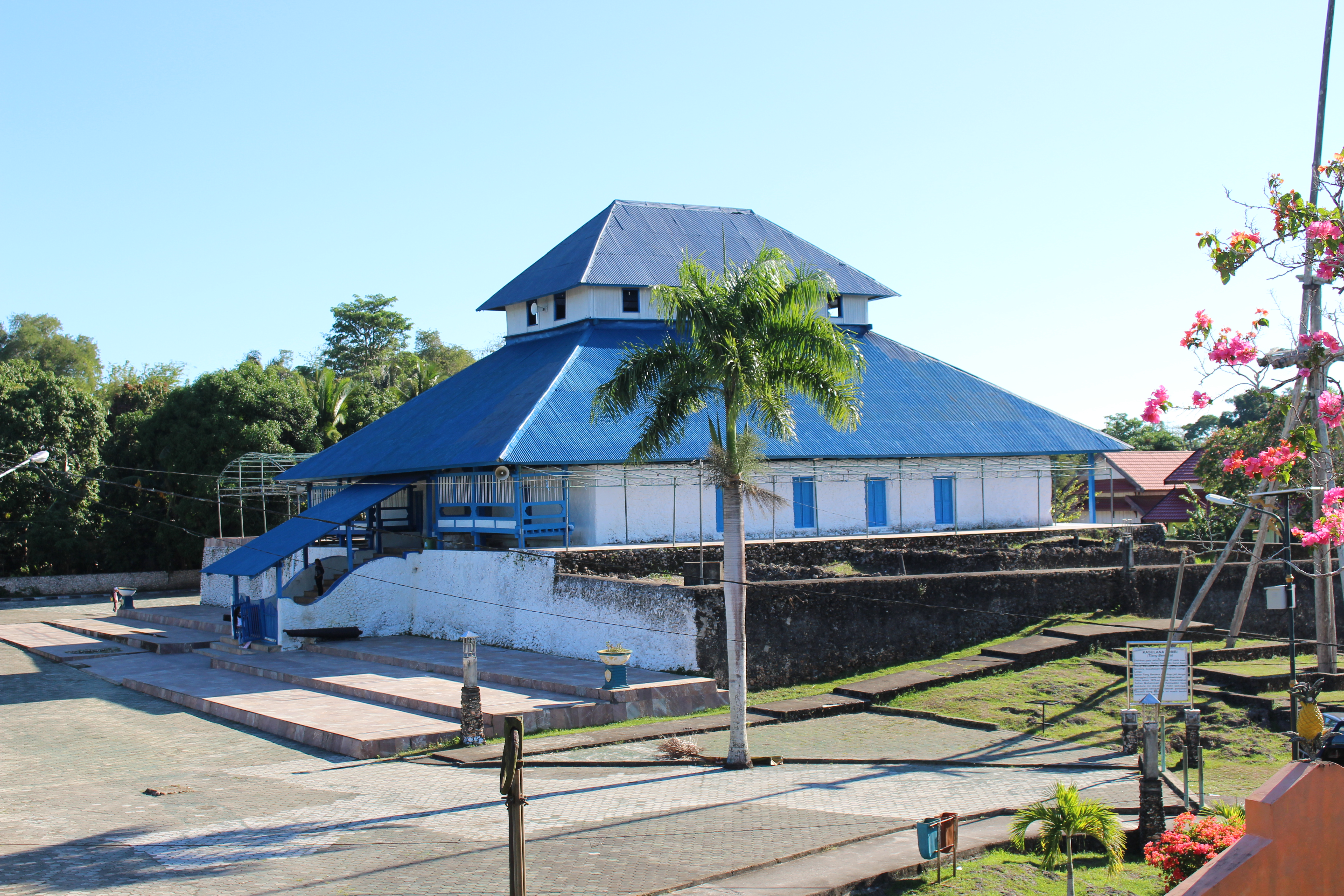 Masjid Agung Keraton Buton yang berada di dalam kawasan Benteng Keraton Buton, Baubau, Buton, Sulawesi Tenggara.